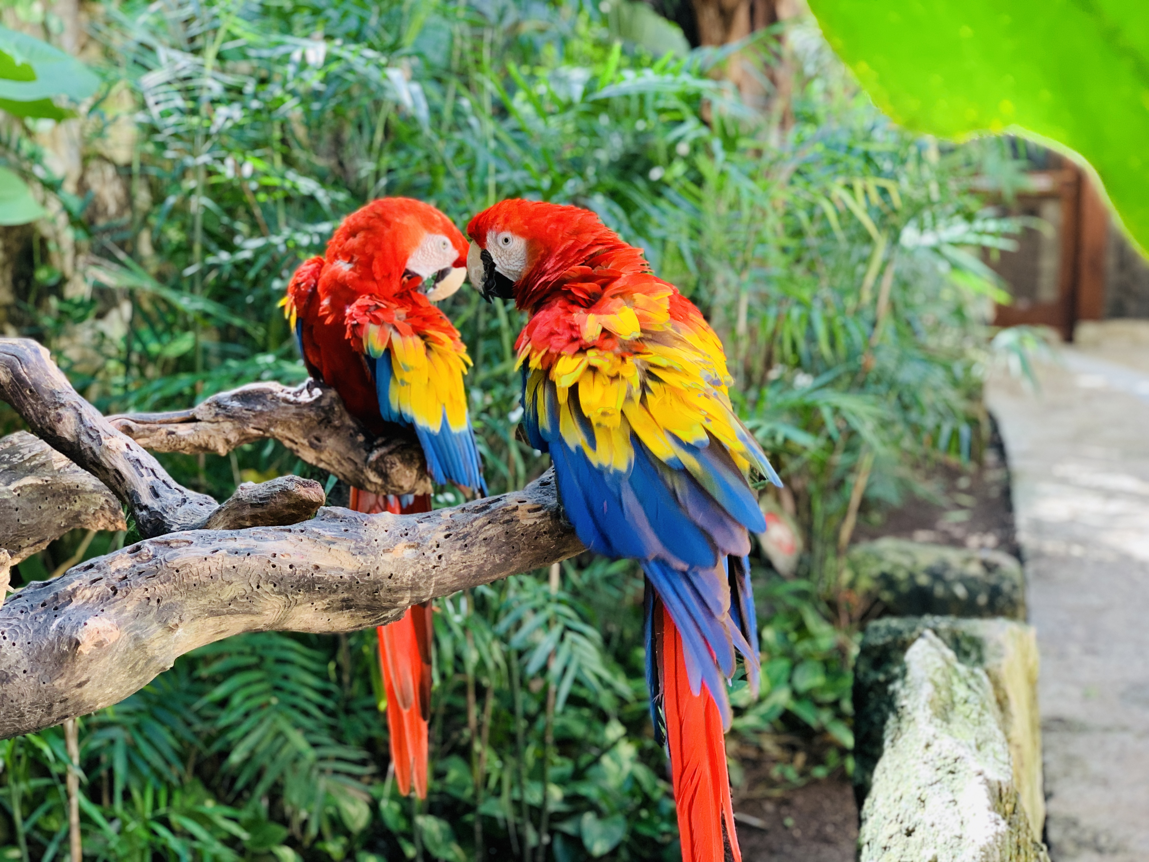 Se ven muy cariñosas estas guacamayas